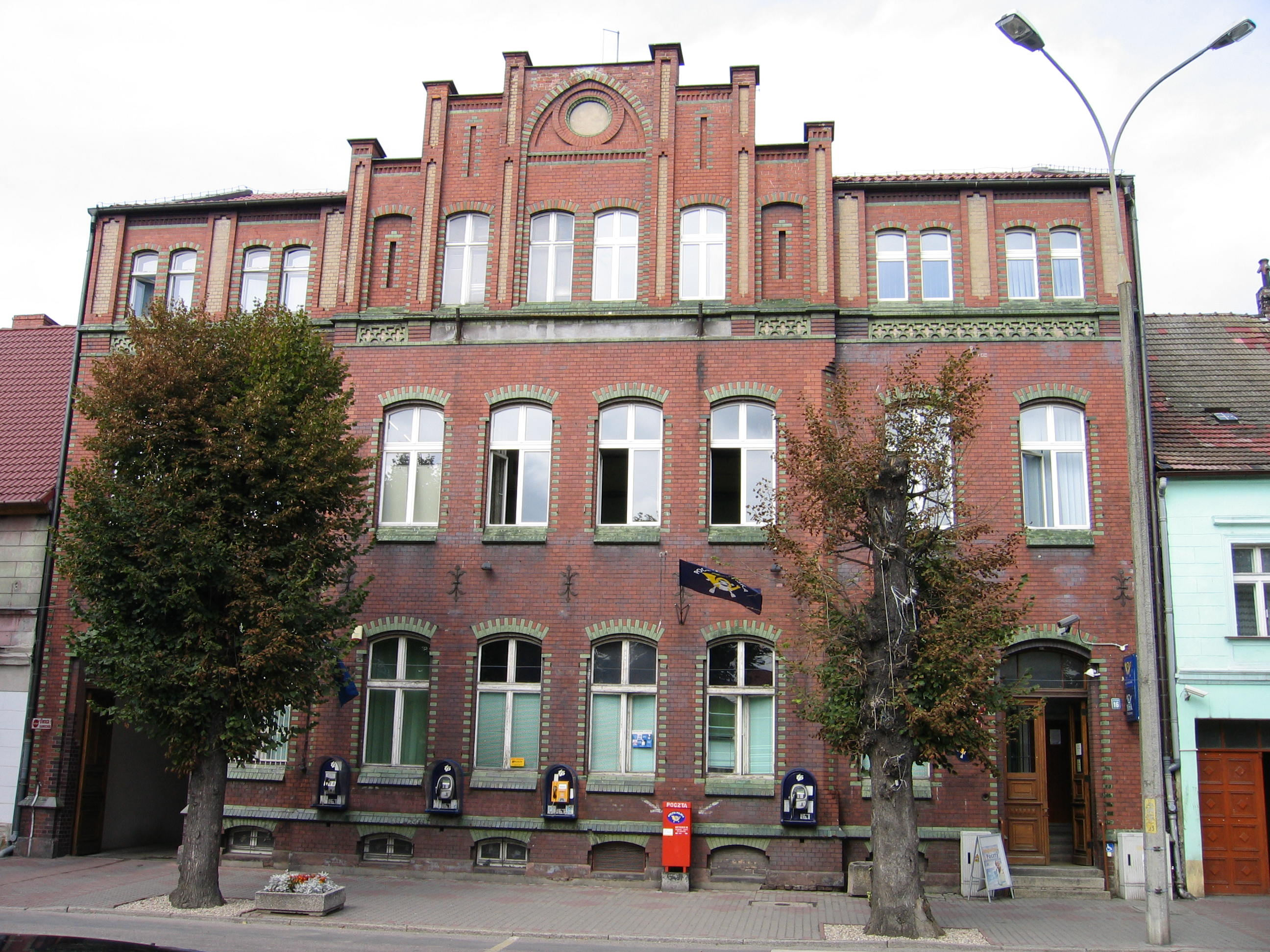 poczta Myślibórz, Rynek 16, Myślibórz